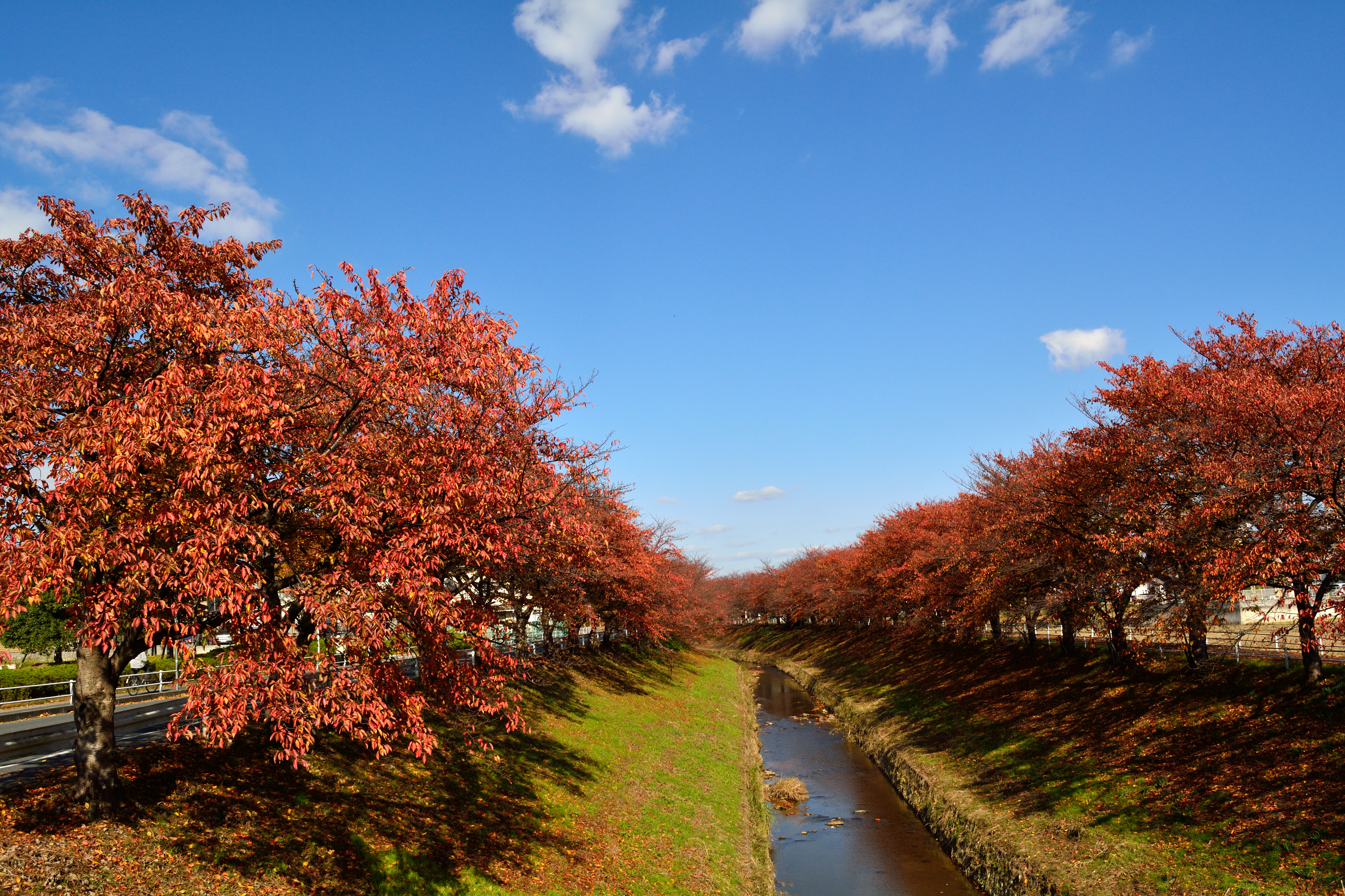 奈良市恋の窪町付近の佐保川